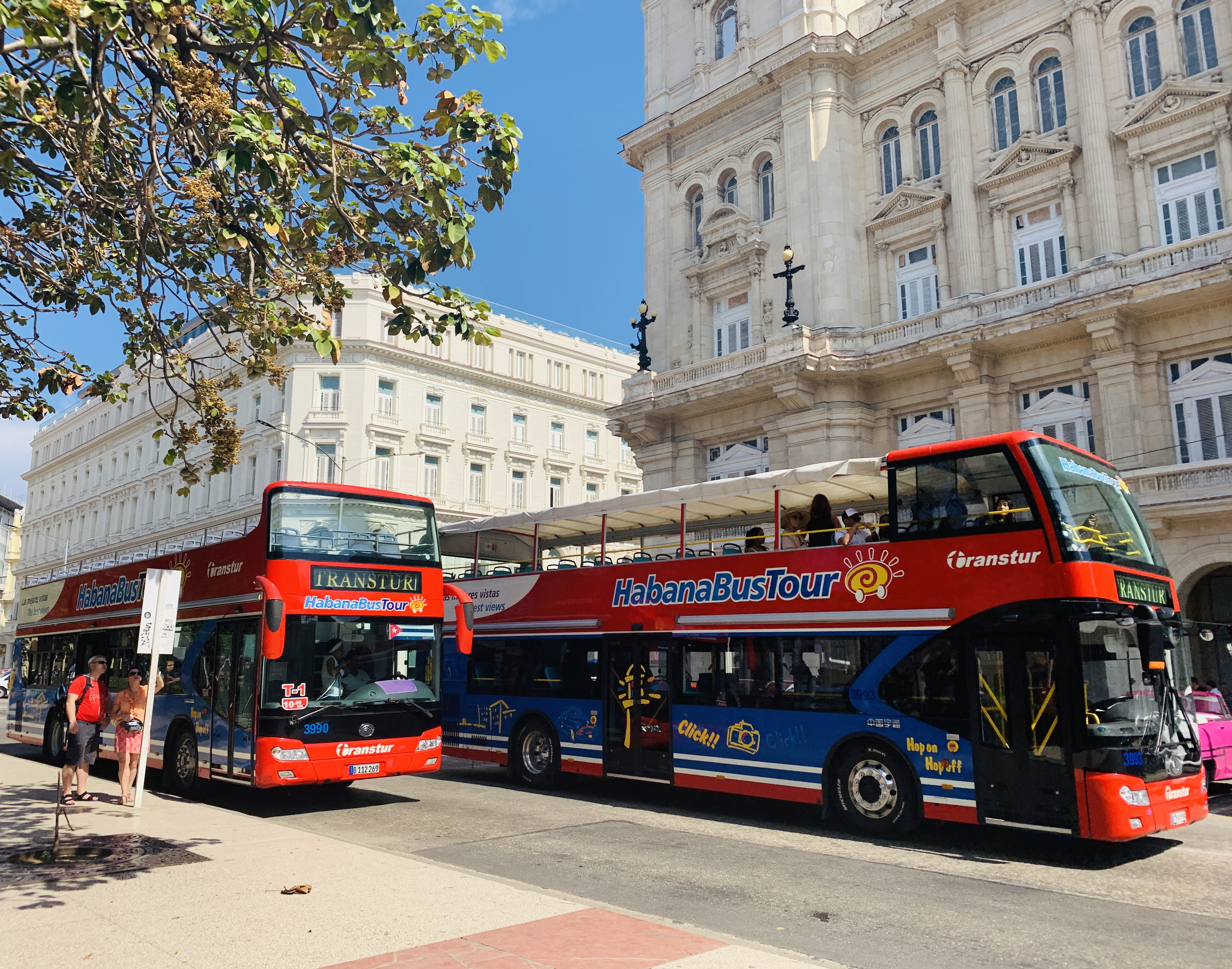 Autobus turistico en el parque central de La Habana.